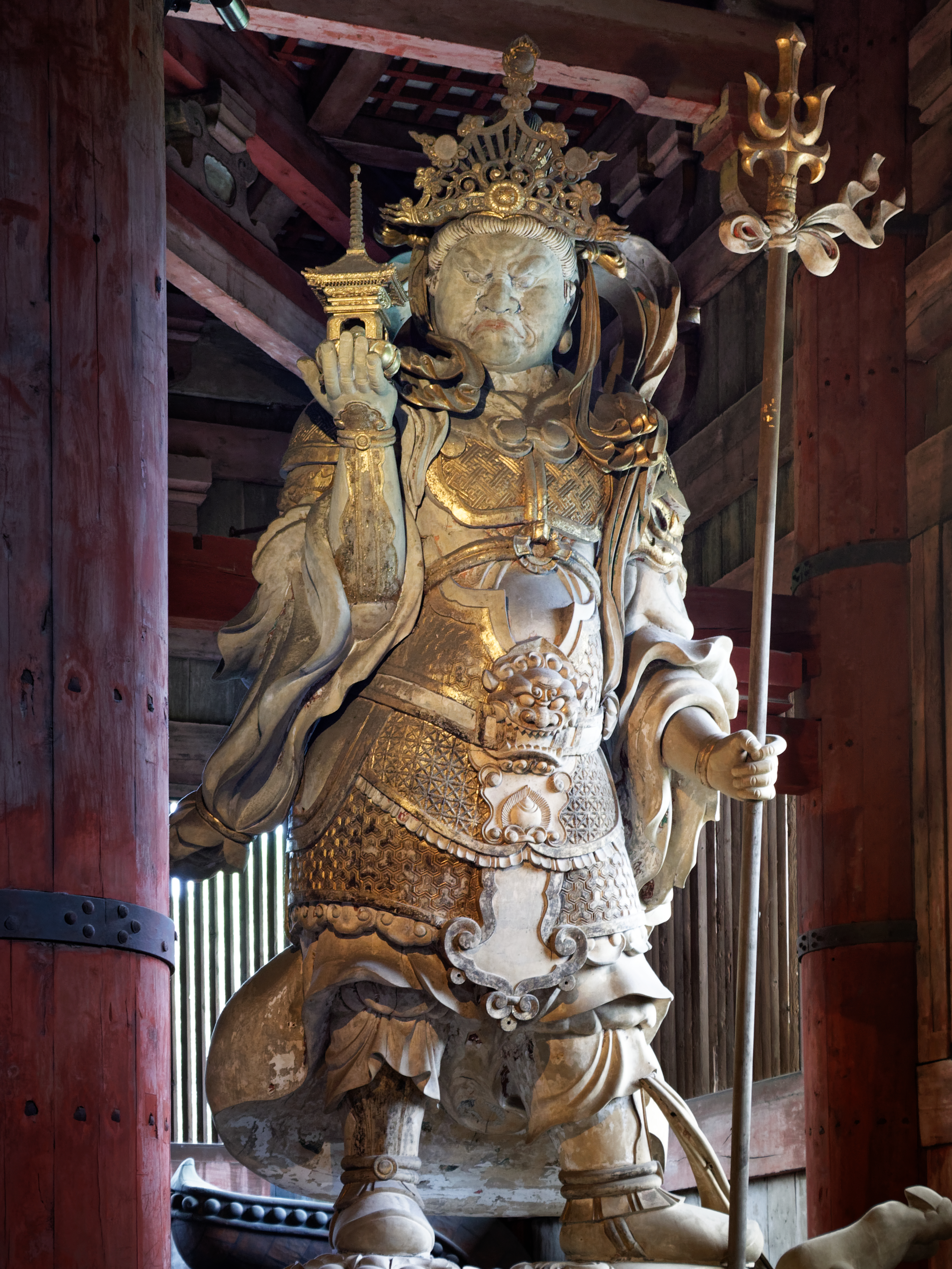 Statue de Tamonten, également appelé Bishamonten. Il est l'un des quatre rois célestes du bouddhisme. Celui qui représenté ici est le gardien à la droite du bouddha au temple Todai-ji à Nara